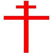 Cruz de los patriarcas de Jerusalen o patriarcal.